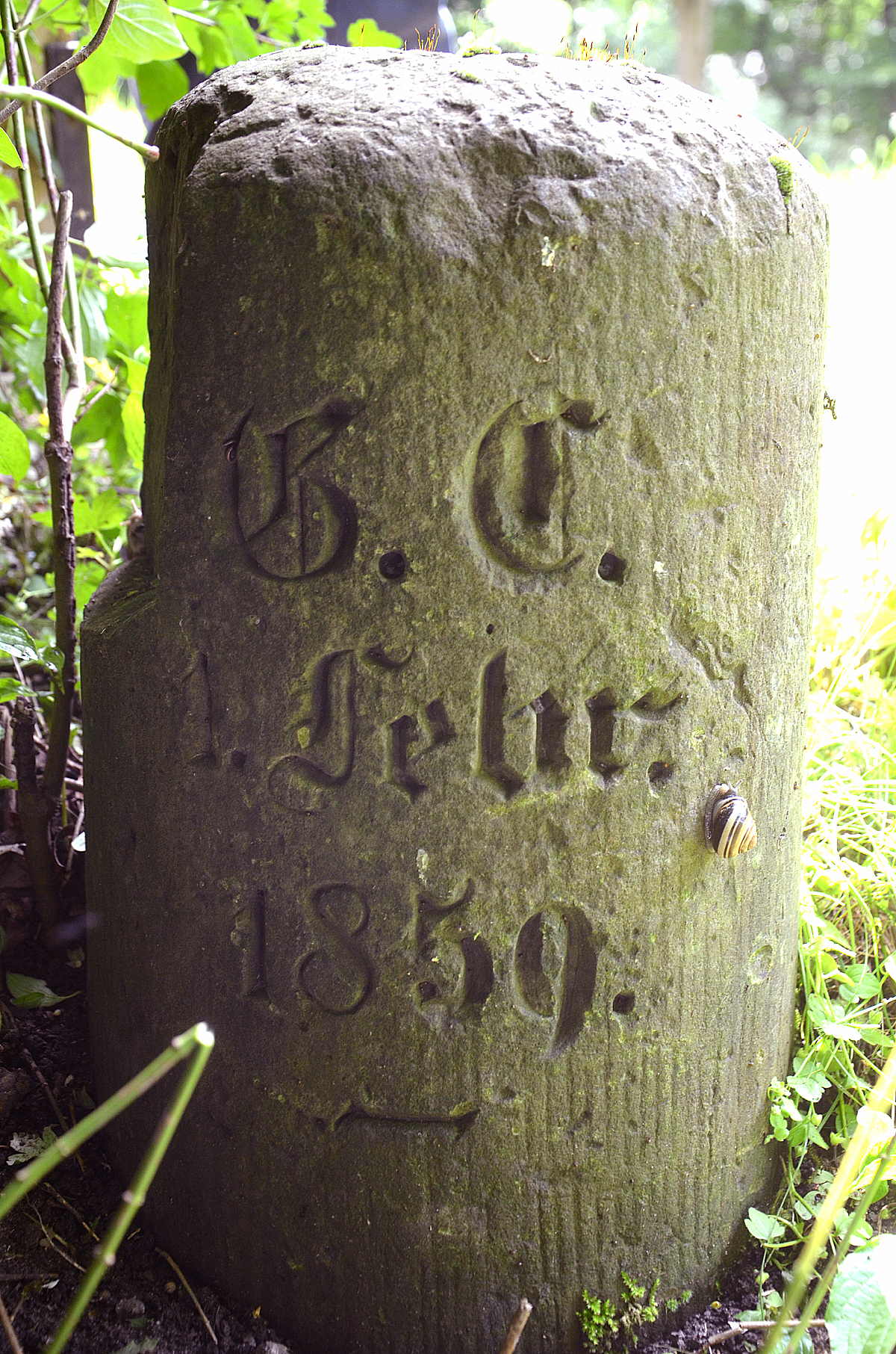 Der Duellstein am Fuß des Rodelberges in Hannover im Stadtteil Kleefeld erinnert an den am 1. Februar 1859 durch ein Pistolenduell zu Tode gekommen Marineoffizier Leutnant Georg Chüden ...